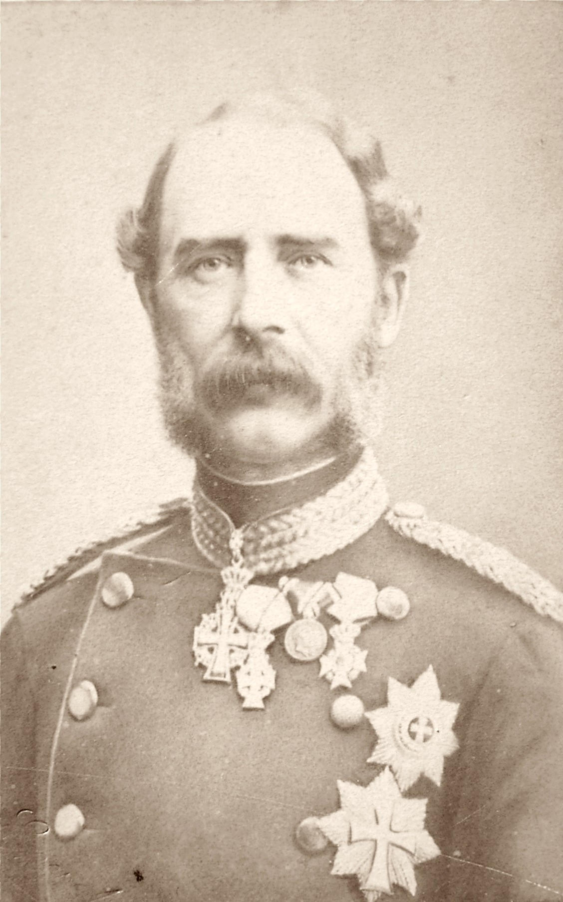 Christian von Holstein Sonderburg Glücksburg, König von Dänmark.